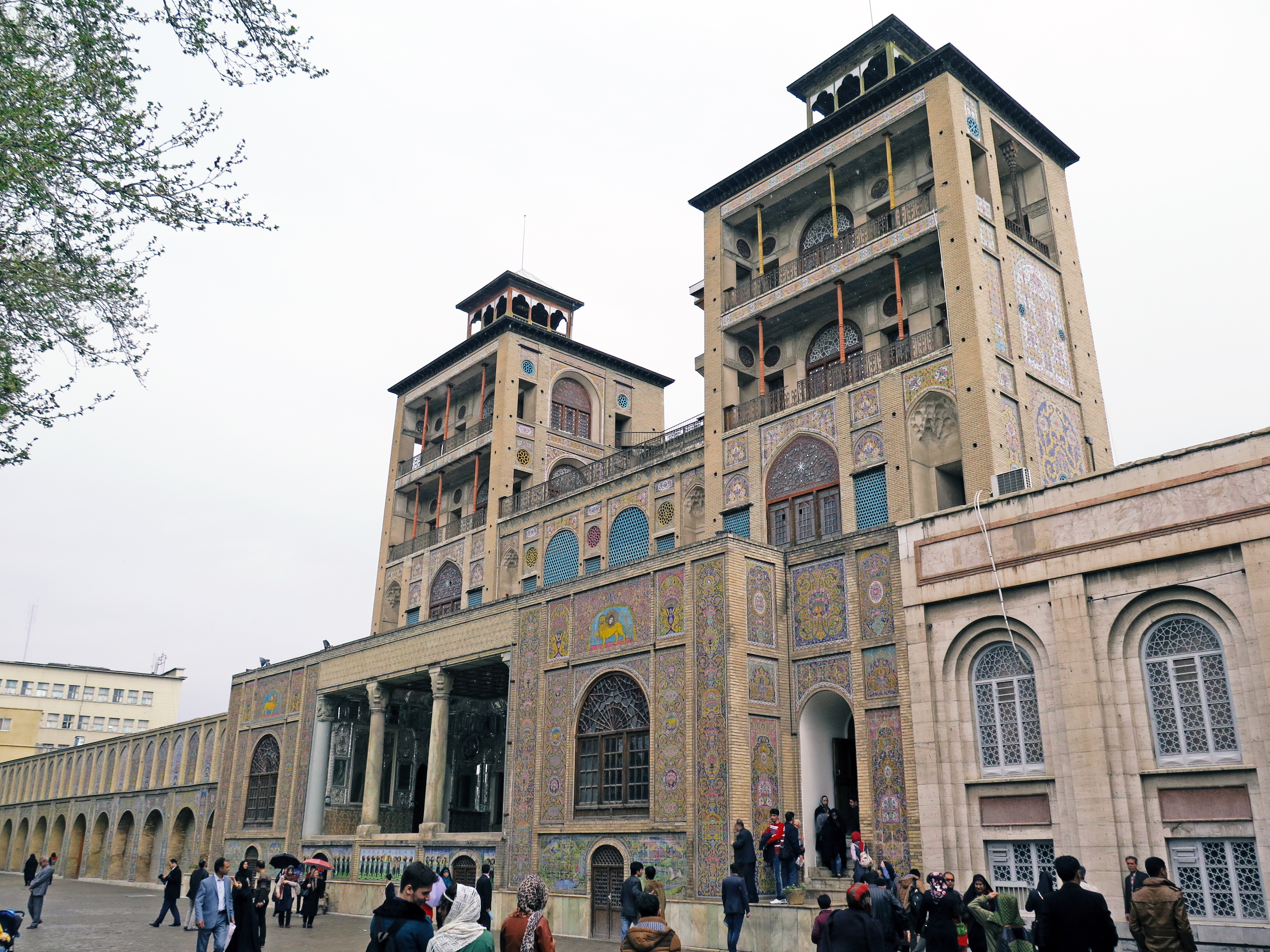 ابنیه سلطنتی مربوط و متصل به کاخ گلستان